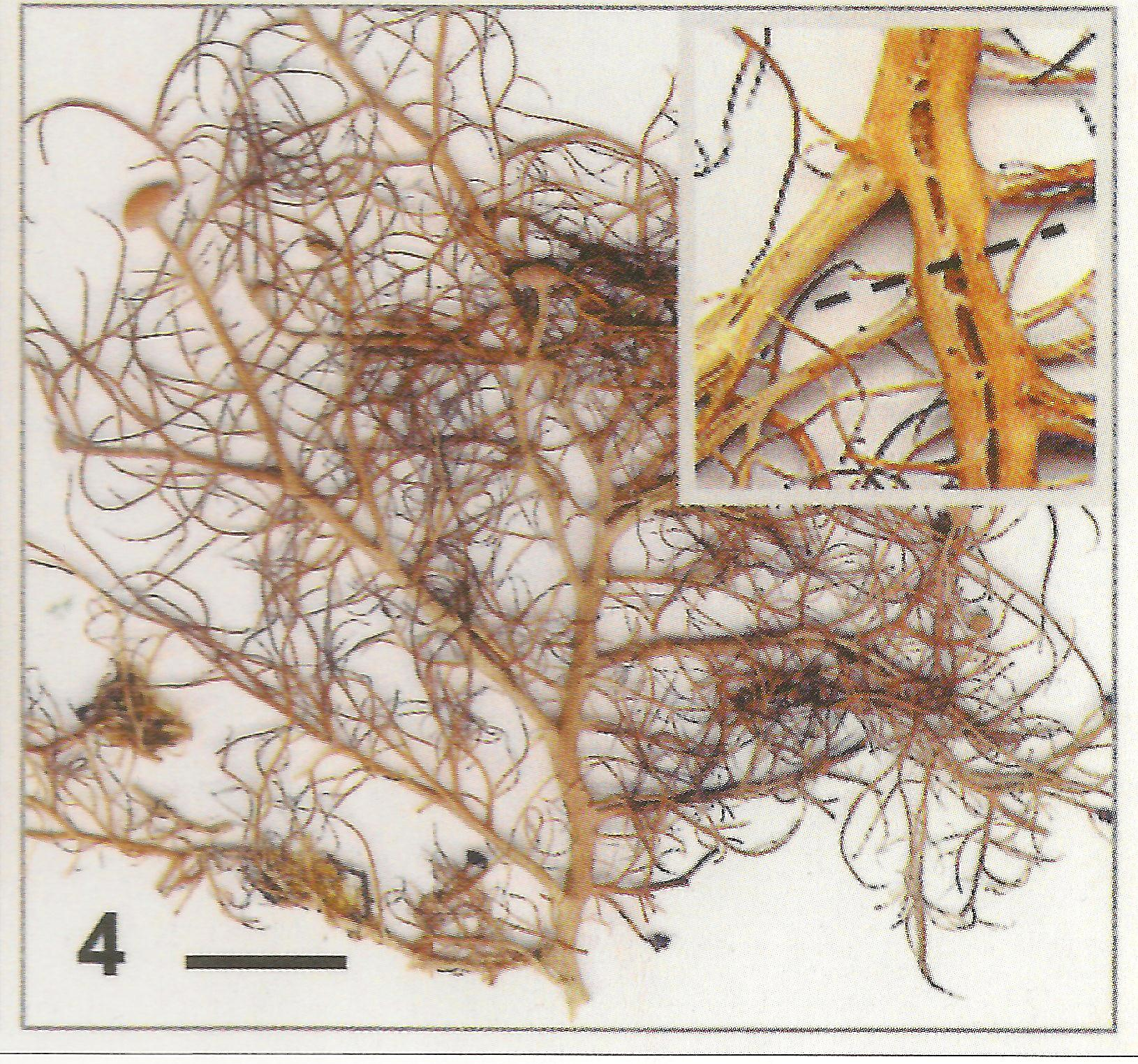 Sulcaria sulcata (Lev.) Bystrek rodzaj lichenizowanych grzybów z rodziny Parmeliaceae